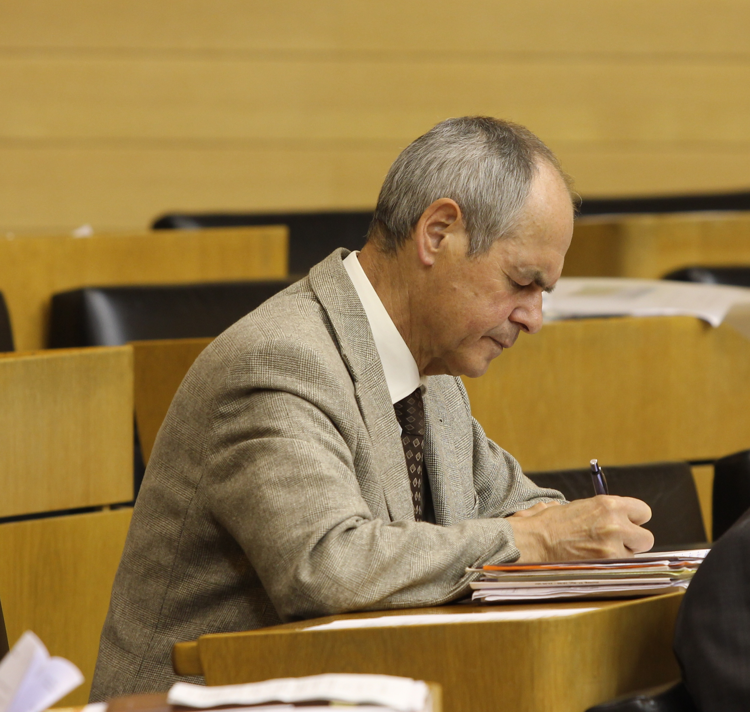 Rudolf Köberle im Plenarsaal des Landtages von Baden-Württemberg. Wikipedia im Landtag – Baden-Württemberg 15.–16. Mai 2013 in Stuttgart Fragen zur Nachnutzung Wenn Sie Fragen zur Nachnutzung dieses Bildes haben, können Sie sich jederzeit gern an wenden Personality rights warningAlthough this work is freely licensed or in the public domain, the person(s) shown may have rights that legally restrict certain re-uses unless those depicted consent to such uses. In these cases, a model release or other evidence of consent could protect you from infringement claims.